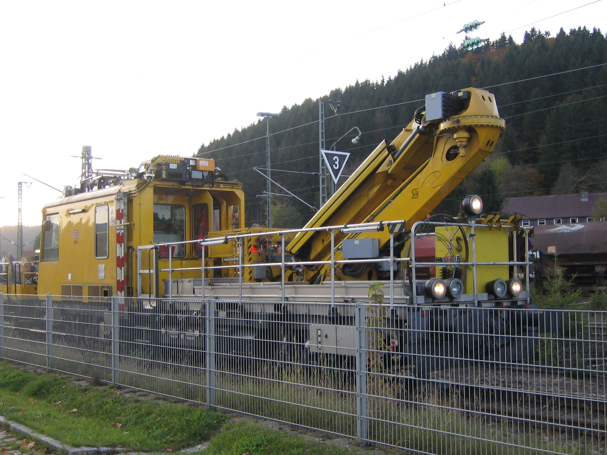 Bahndienstfahrzeug: Fahrzeug und ex-Ks des Fahrleitungsdienstes. Wird zum Unterhalt und Reparatur der Fahrleitung verwendet. Der Kran besitzt eine Arbeitsplattform, und der Stromabnehmer ist zum Ausrichten und Ausmessen der Fahrleitung notwendig (und kann meist auch als Zwischenerdung verwendet werden). Man beachte auch die Beobachtungskanzel hinter dem Einholmstromabnehmer. Auf dem ex-Ks sind Kabelrollem mit Fahrleitungsdrähten.